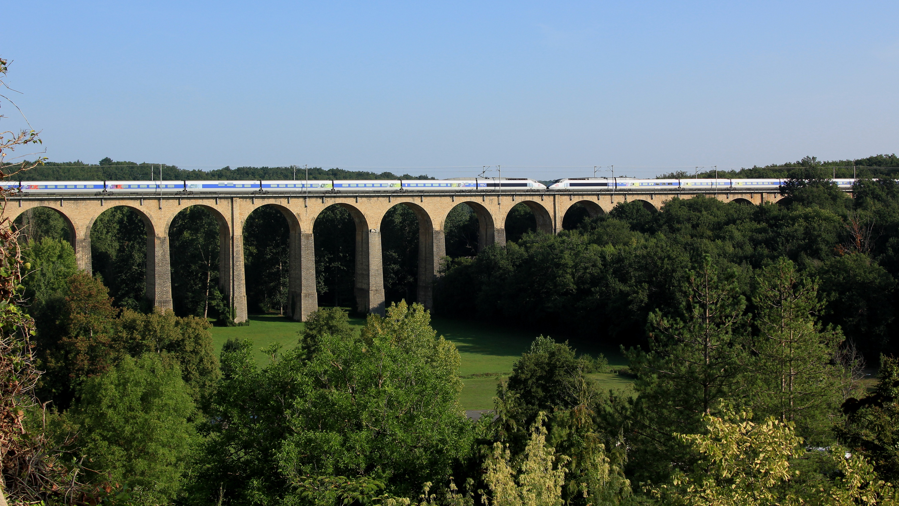 Les rames TGV Atlantique n° 304 et 392 assurant un TGV Paris-Montparnasse - La Rochelle, passent sur le viaduc de Lusignan.